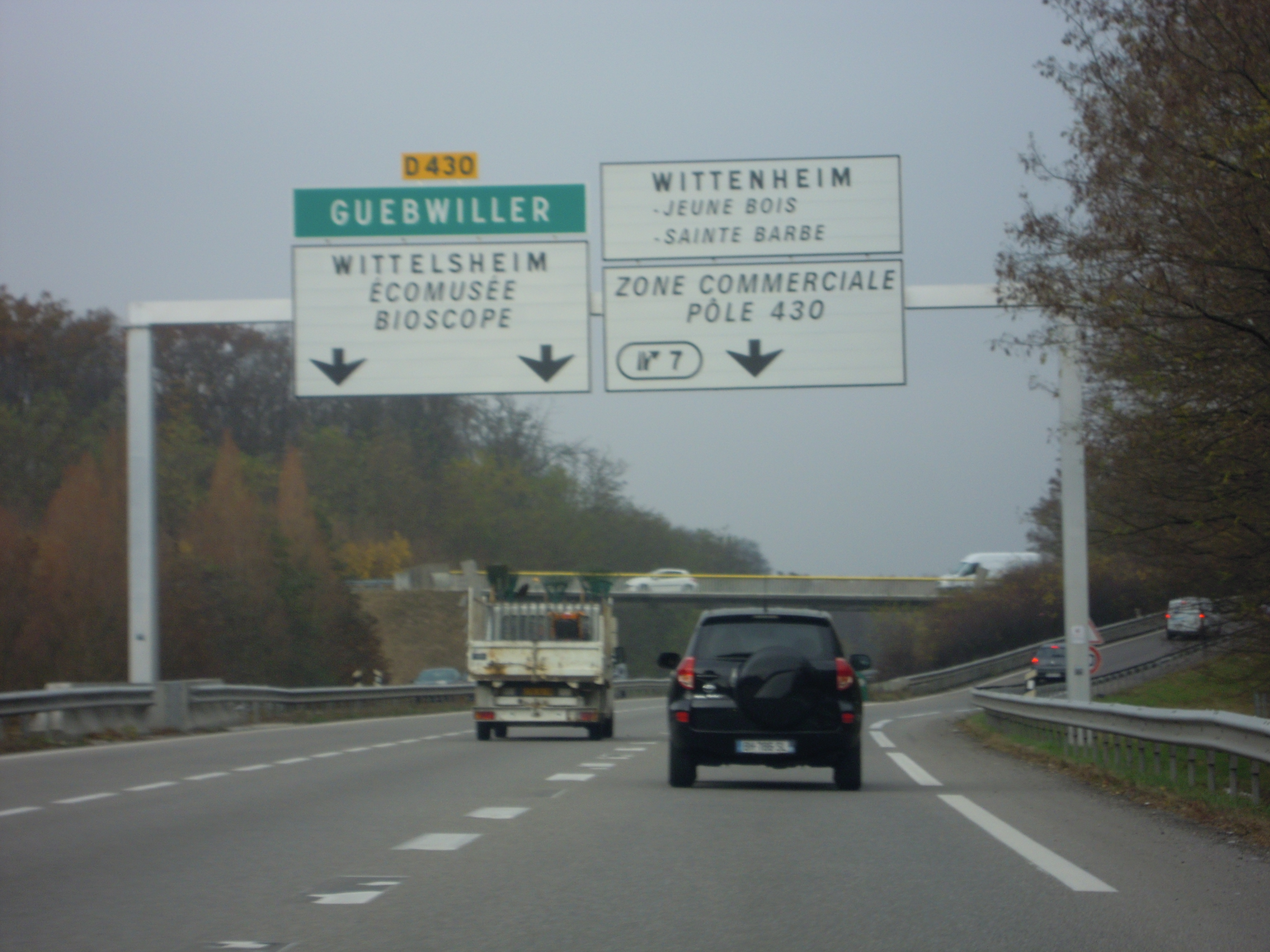 La route D430 du Haut-Rhin à hauteur de Wittenheim